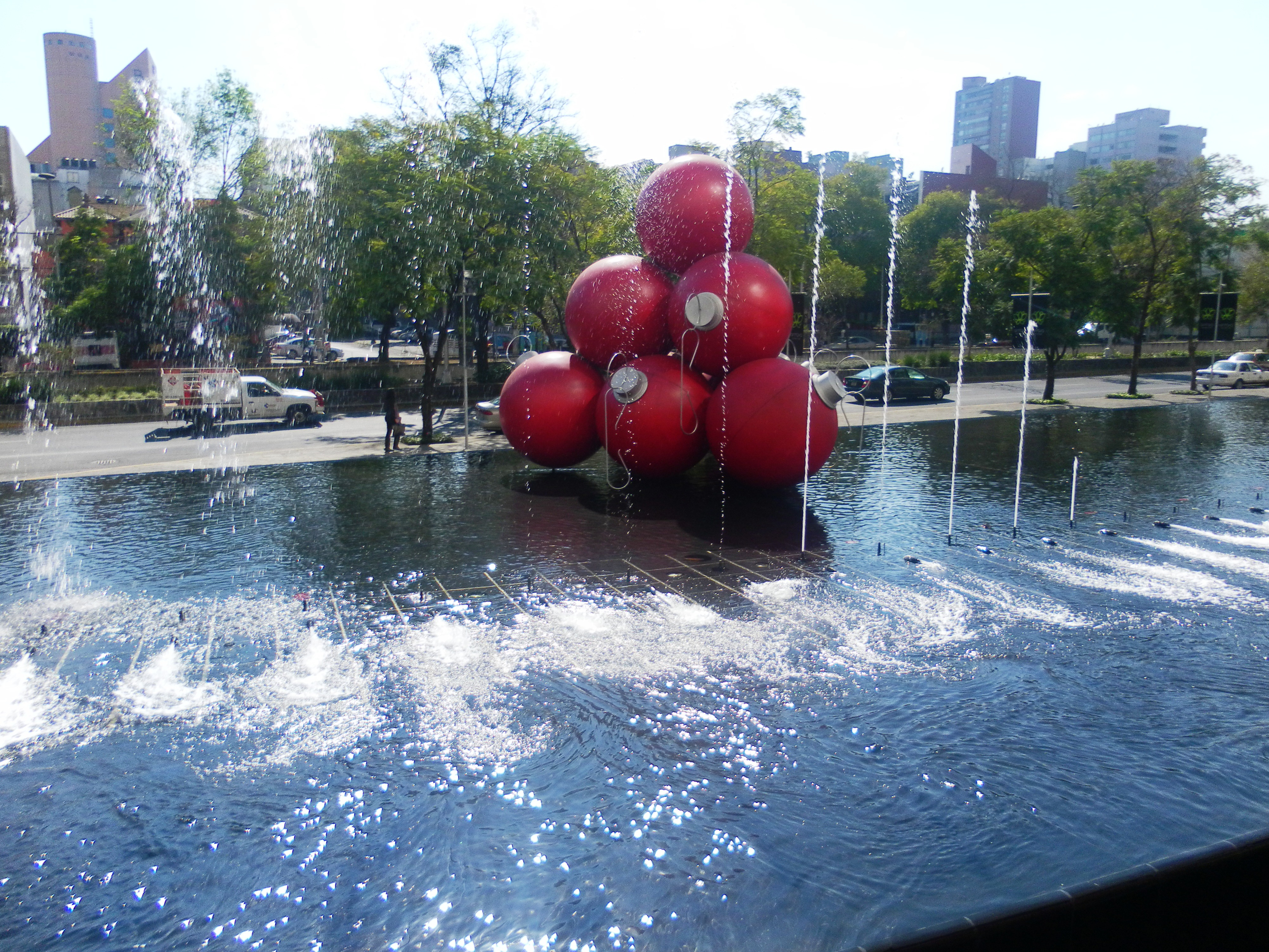 Outside Antara Polanco